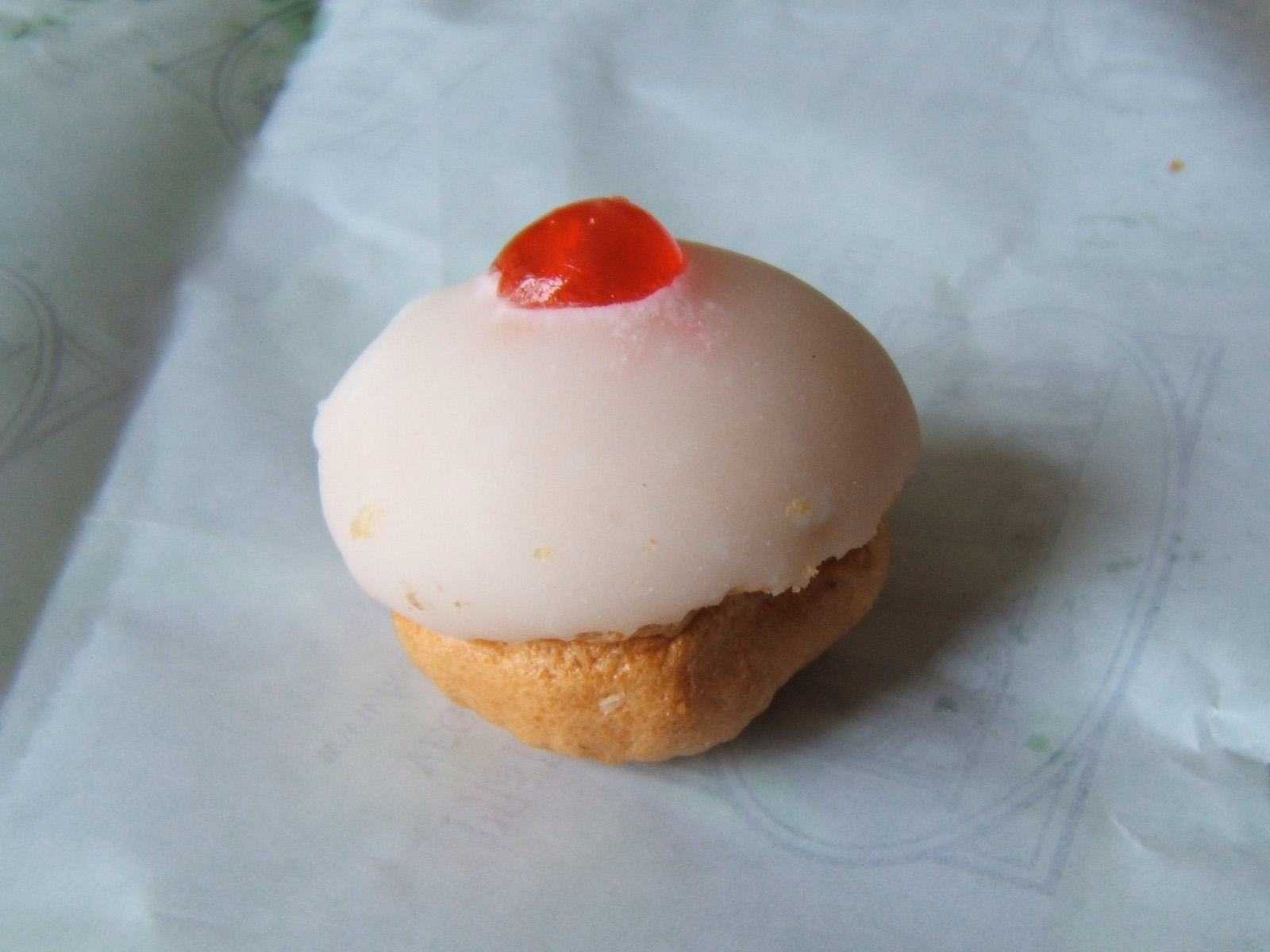 bocca di dama formato mignon